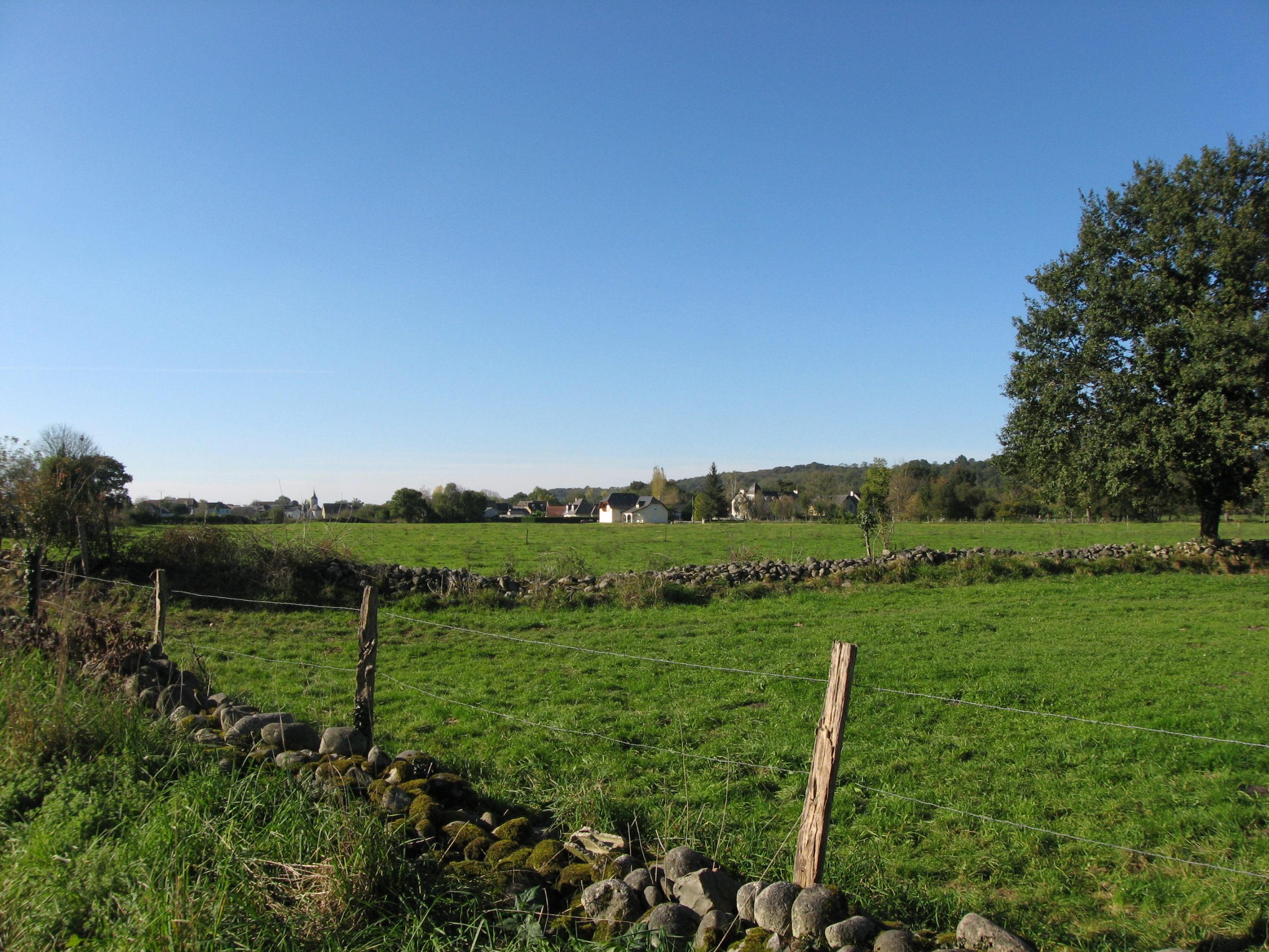 Vue du village de Précilhon depuis le parcours/promenade vers Escou (Pyrénées-Atlantiques) Pyrénées).